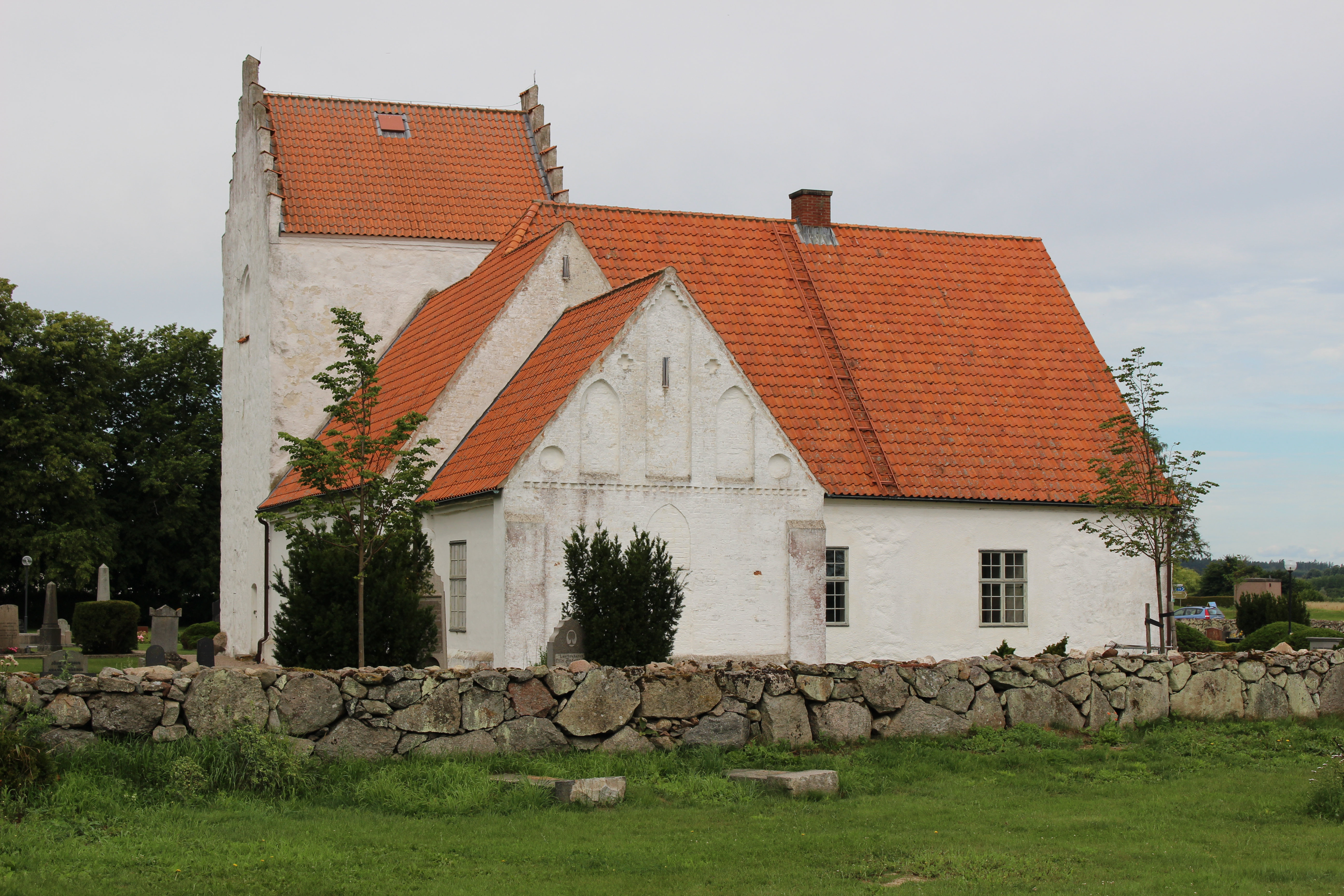 Kiaby kyrka från öster.